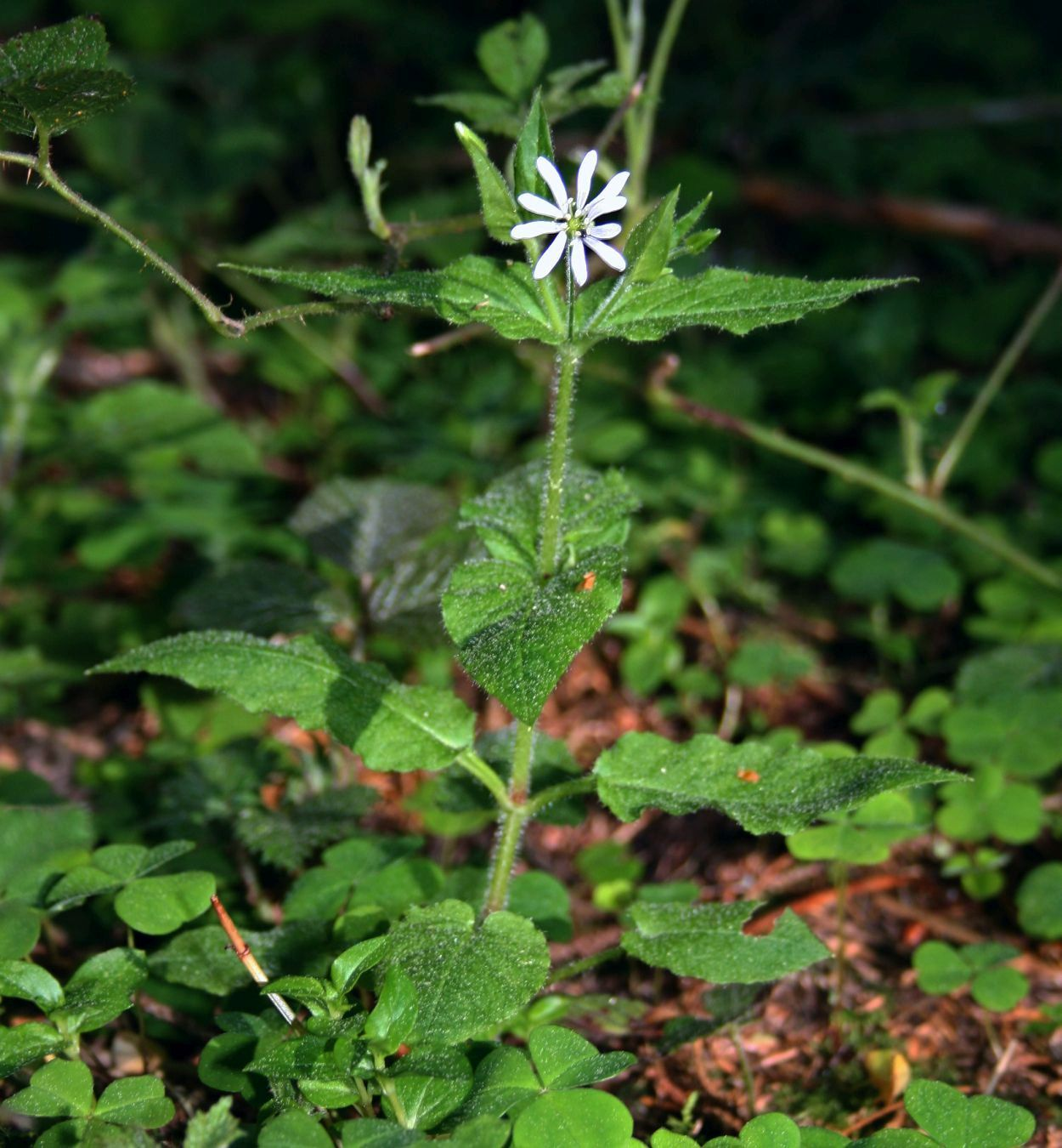 Wald-Sternmiere (Stellaria nemorum subsp. nemorum), Nelkengewächse (Caryophyllaceae) – Österreich/Austria/Autriche: Tirol, Kitzbüheler Alpen, Jochbergwald ca. 2,5 km N Pass Thurn, ca. 1060 m